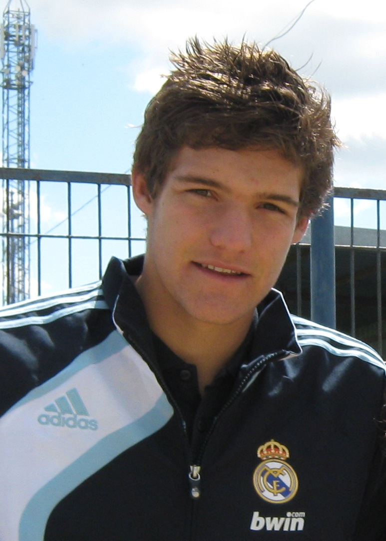 Marcos Alonso (n. 1990), futbolista. Nieto de Marquitos.